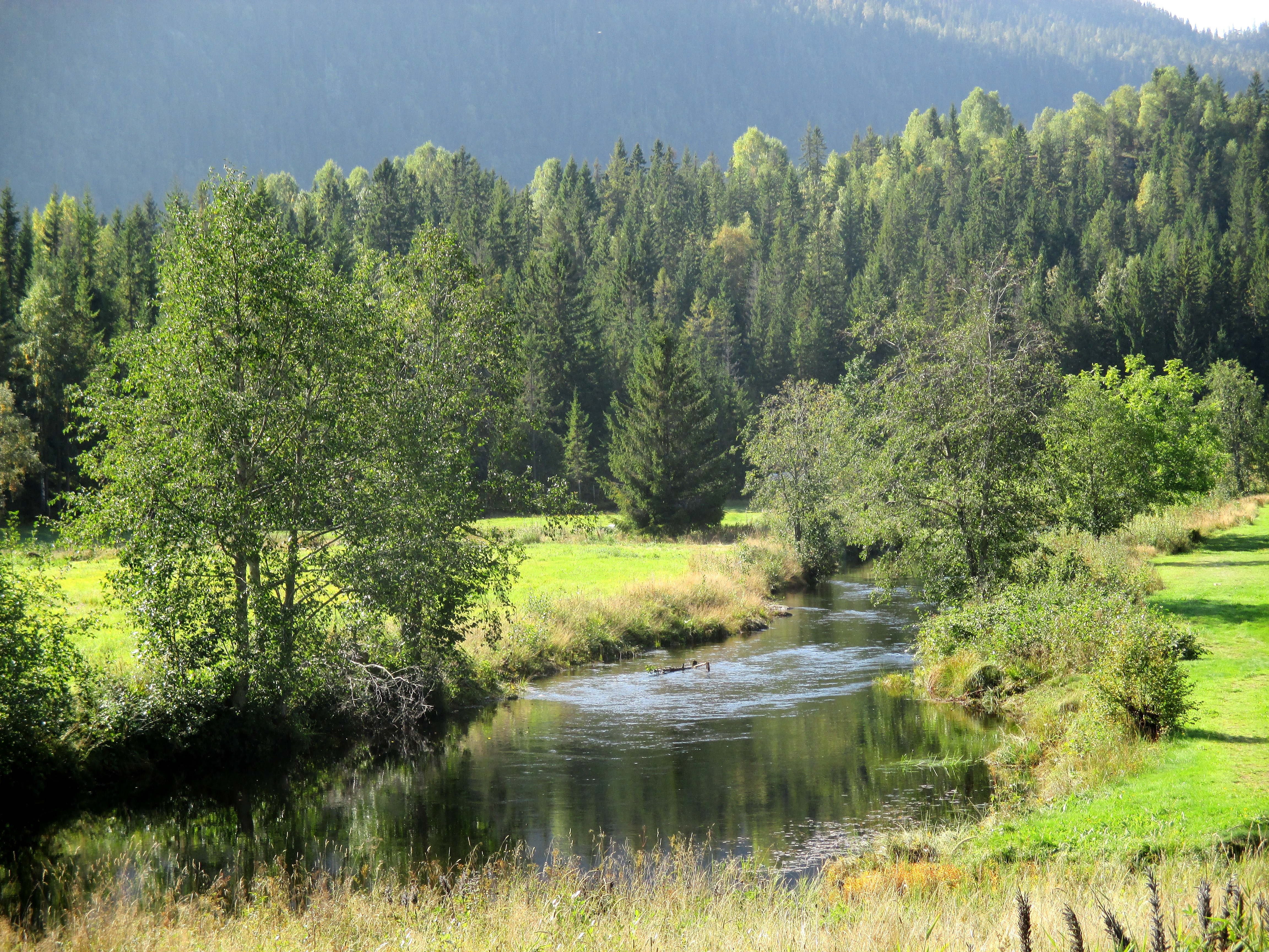 Hjartdøla like nedenfor Hjartdal kirke